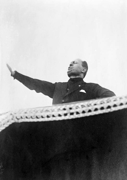 Die Geste der rechten Hand ! Typische Rednergesten, bei welchen die Bewegung der rechten Hand den Höhepunkt in den Ausführungen des Redners unterstreicht. Der italienische Diktator Mussolini bei einer flammenden Ansprache. Information added by Wikimedia users.